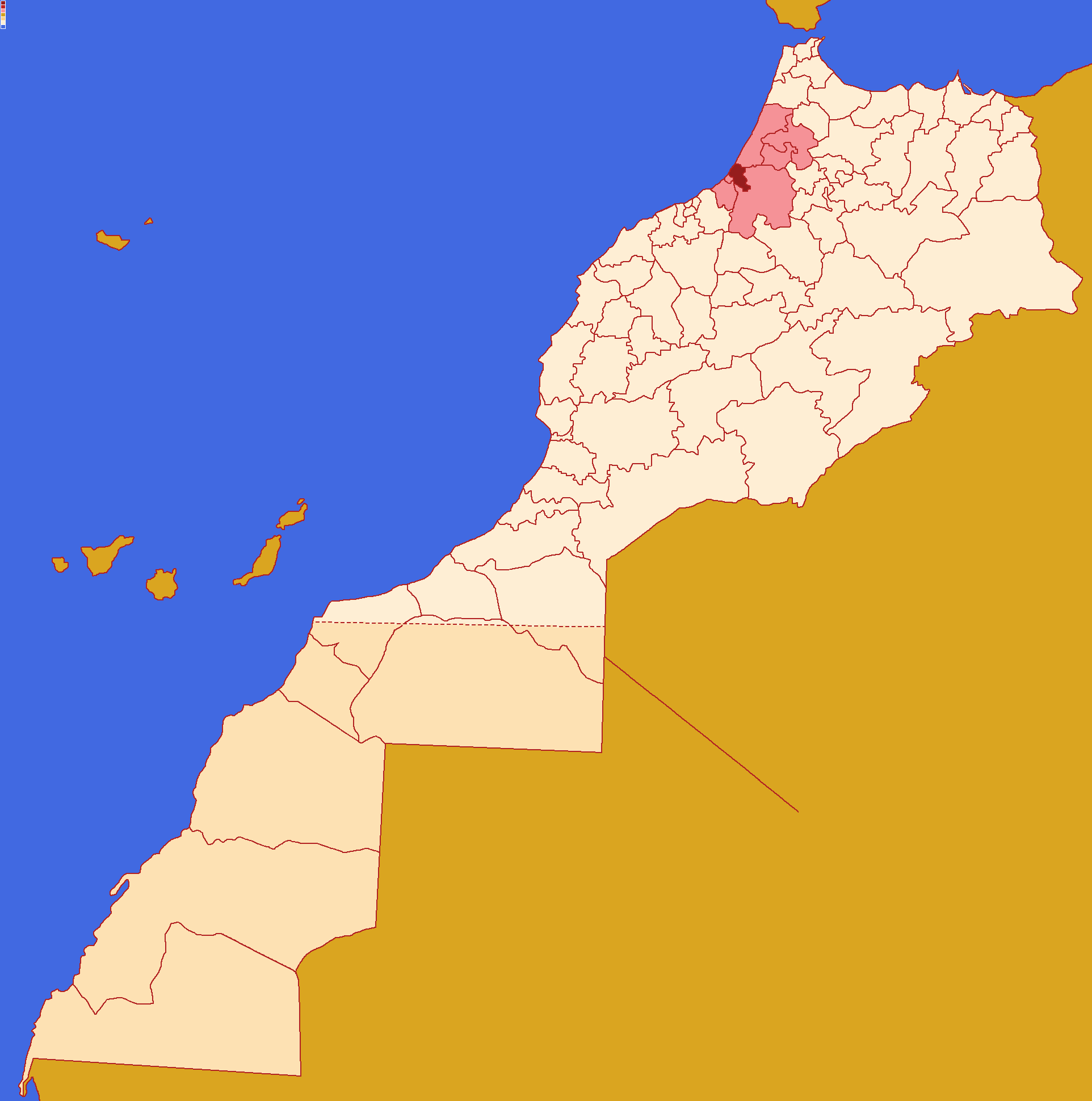 Localização da prefeitura de Salé dentro da região de Rabate-Salé-Quenitra e dentro de Marrocos. Conforme a reforma administrativa de 2015.